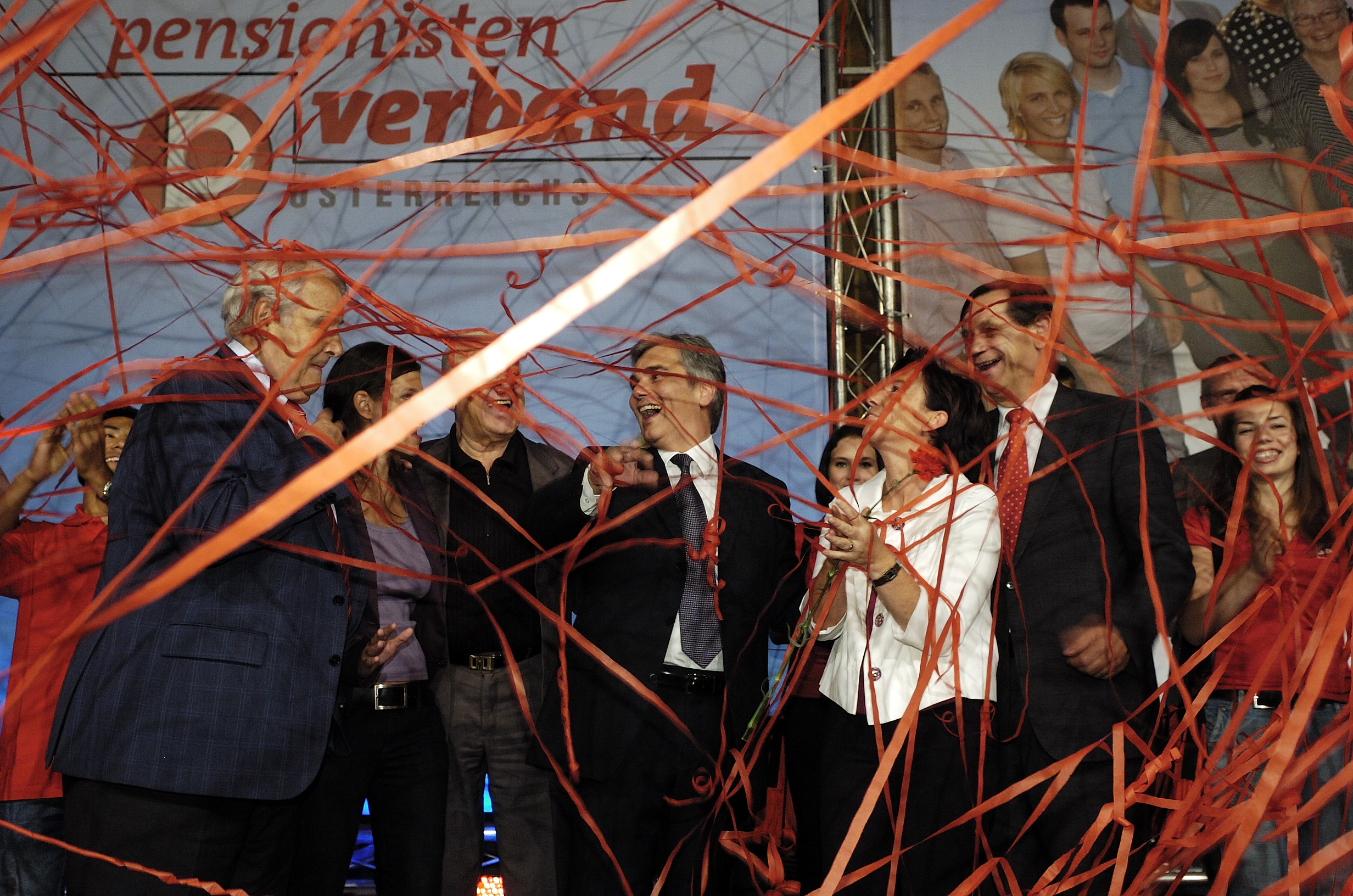 Ausgelassene Stimmung: Werner Faymann, Martina Ludwig-Faymann und Abgeordneter Hannes Bauer bei der Wahlkampfveranstaltung des PVÖ im Messezentrum Wien. 01.09.2008, © Thomas Jantzen/SPÖ.